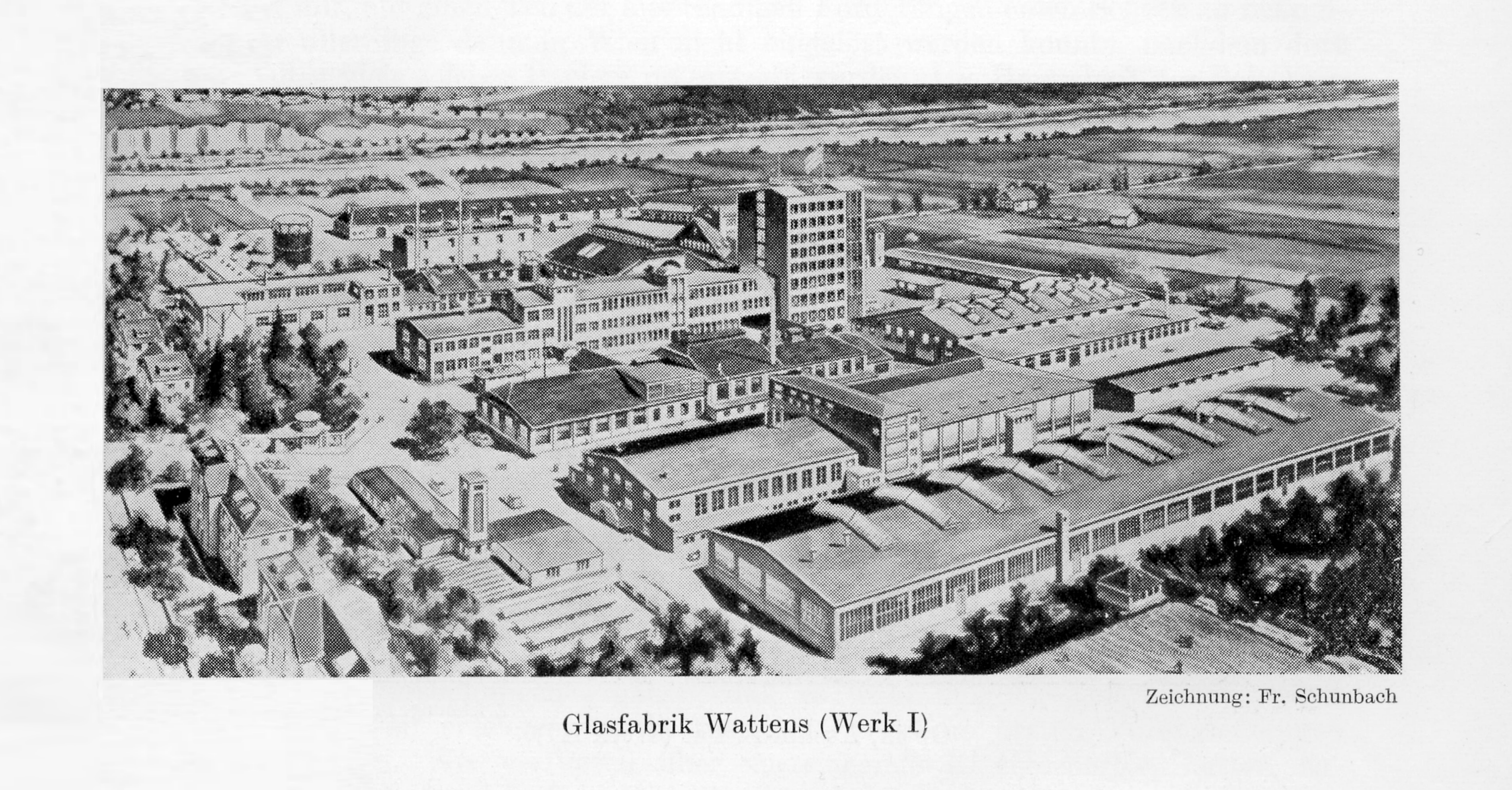 Glasfabrik Wattens ( Werk I )